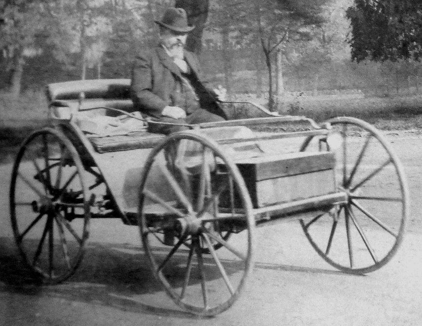 Andreas Flocken (1845 - 1913) mit dem Elektrowagen im Coburger Hofgarten